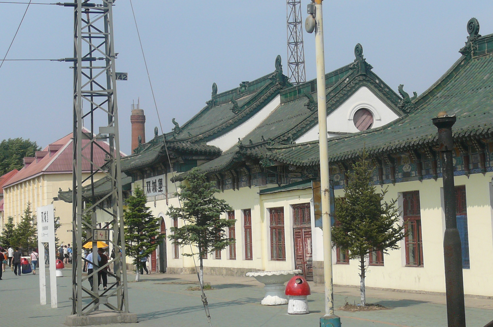 双城堡駅舎